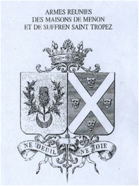 Blason des maison De Menon (à gauche) et De Suffren Saint Tropez (à droite). Issu du 39e volume des annales historique édité en 1865 et écrite par m. TISSERON.